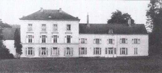 Carte postale du Château de Hameau à Ham-sur-Heure